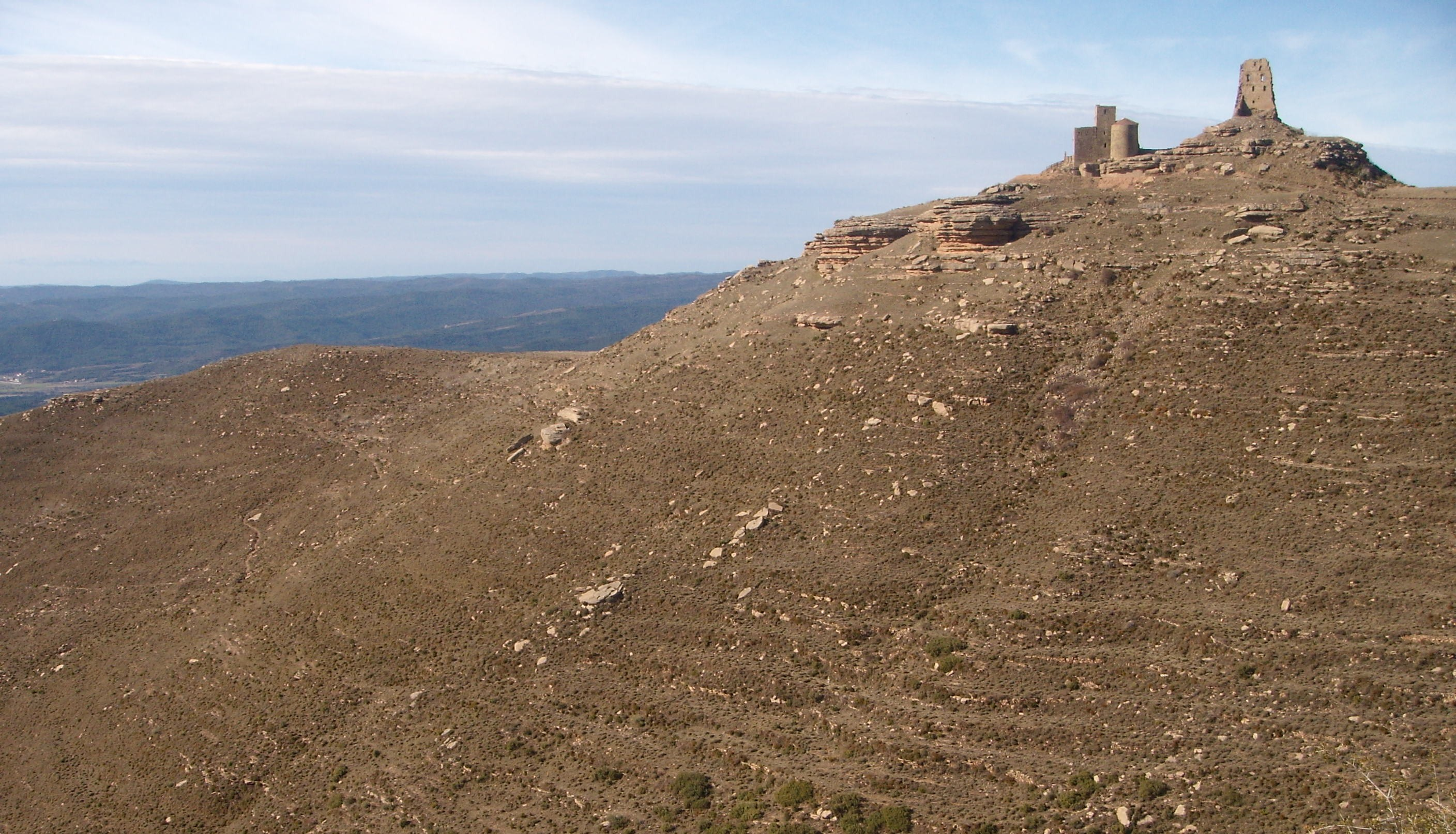 El castillo de Marcuello de variada grafía en documentos antiguos -«Marcorllo», «Mequrlo», etc.- era uno de los principales del sector central del Prepirineo, formando un grupo geográfico con los de Murillo, Agüero, Ayerbe, Loarre, que a comienzos del Siglo XII gobernaba la reina viuda Berta.